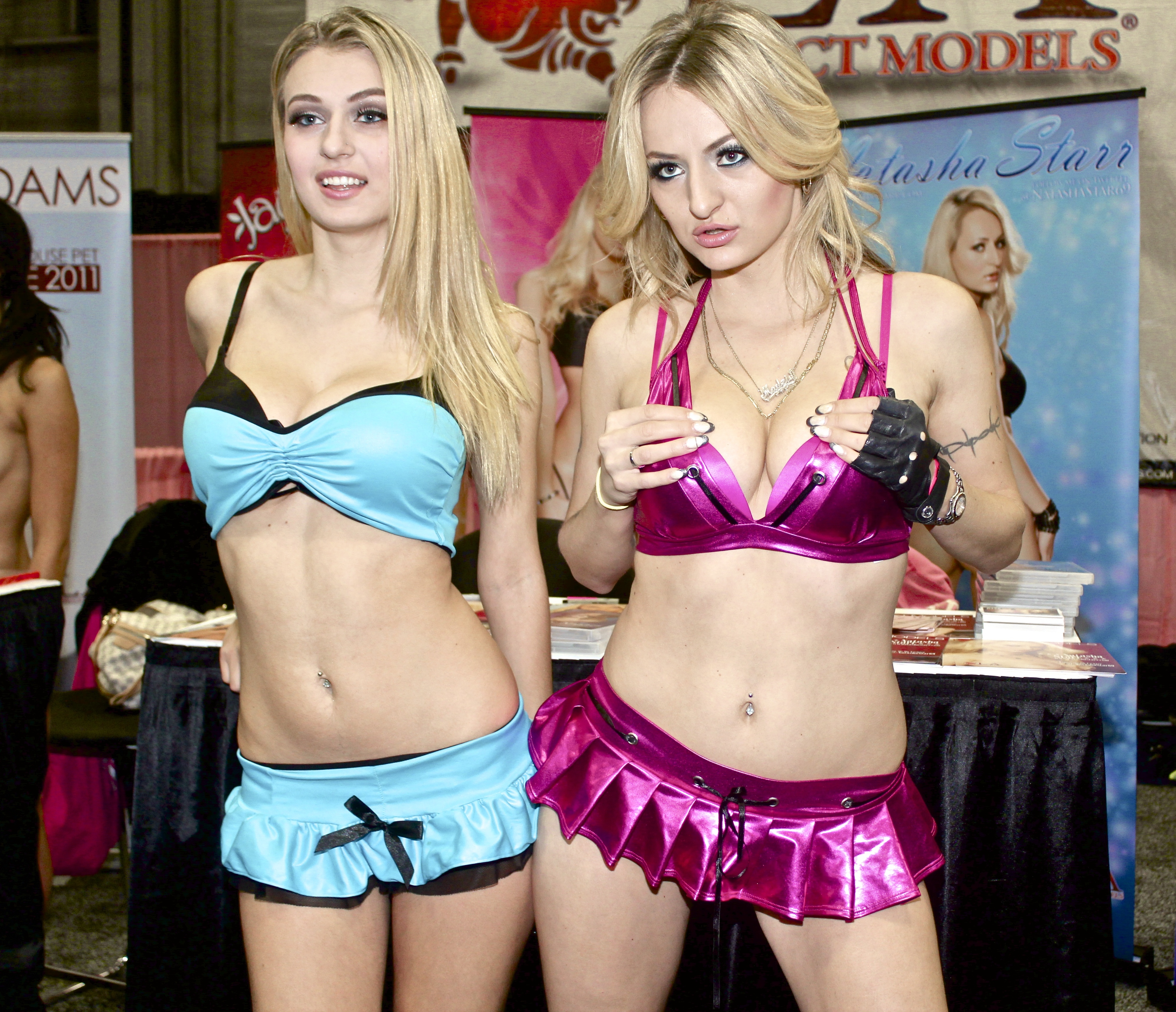 Exxxotica NJ 2012, Natalia Starr & Natasha Starr